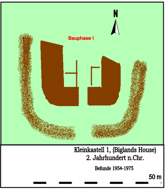 Befundskizze des Kleinkastell 1 (Biglands House), Küstenschutz Cumbria/Hadrianswall.